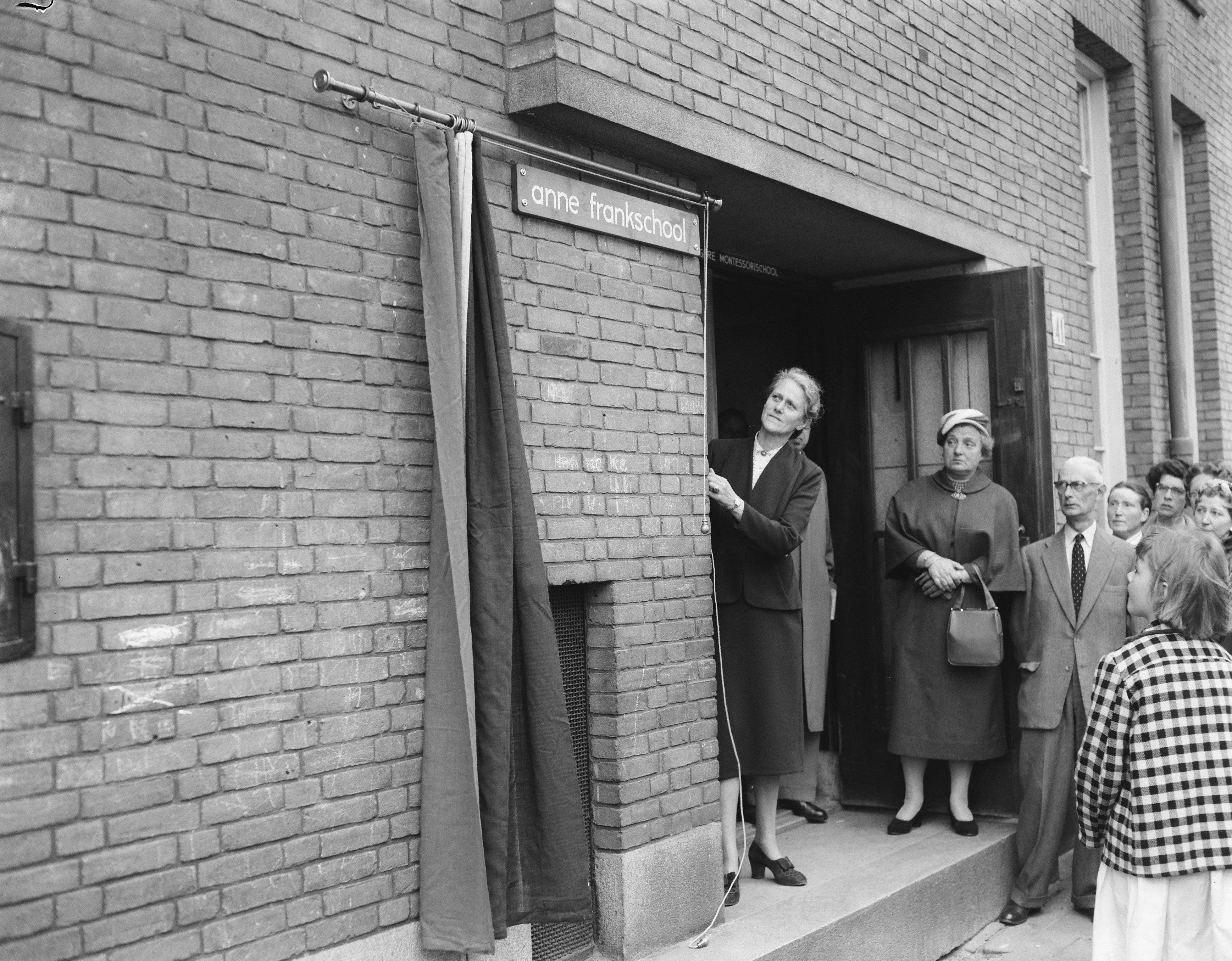 Collectie / Archief : Fotocollectie Anefo Reportage / Serie : [ onbekend ] Beschrijving : Opening Anne Frankschool in de Nierstraat Datum : 12 juni 1957 Trefwoorden : scholen Fotograaf : Rossem, Wim van / Anefo Auteursrechthebbende : Nationaal Archief Materiaalsoort : Negatief (zwart/wit) Nummer archiefinventaris : bekijk toegang 2.24.01.04 Bestanddeelnummer : 908-6703